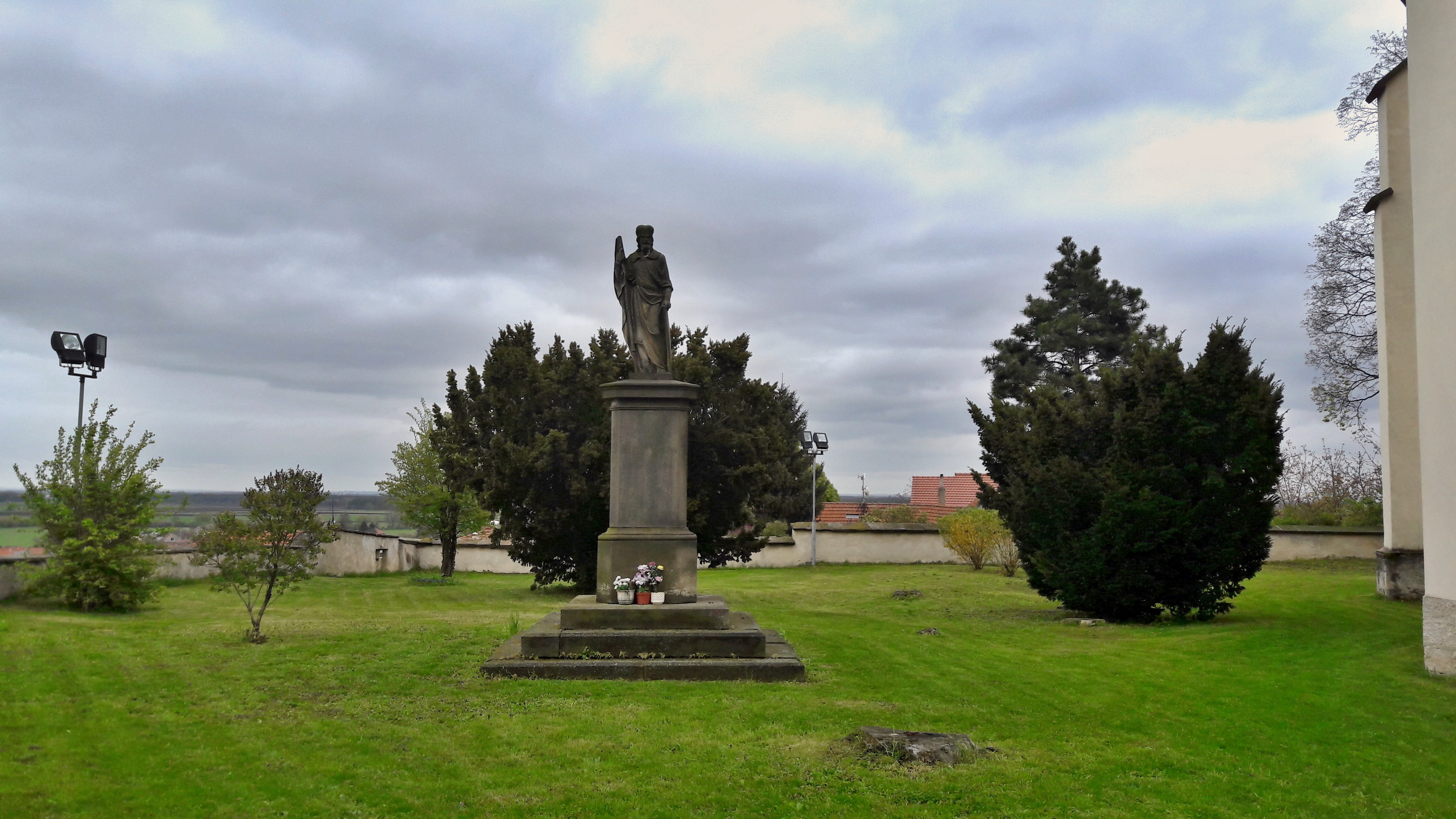 Sadská